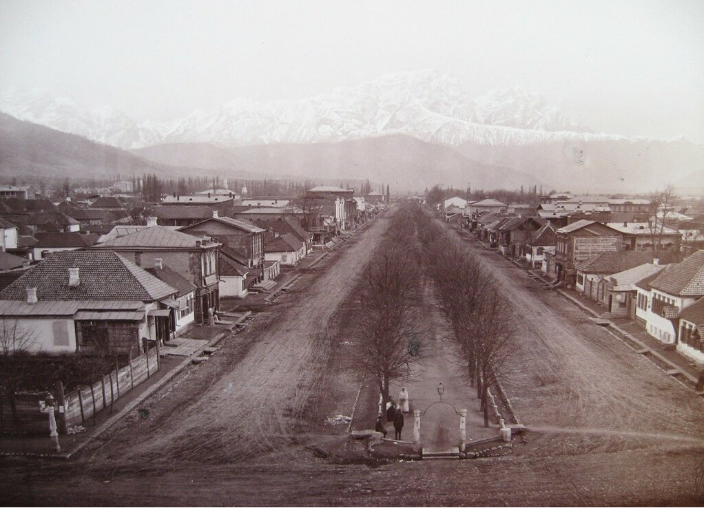 Александровский проспект в дореволюционном Владикавказе